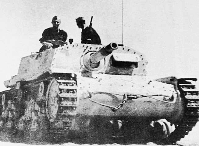 Il Semovente 75/18 (scafo M 40), primo frutto del tentativo di adeguare la nostra artiglieria alla presenza massiccia di mezzi corazzati tra le file nemiche, nacque sullo scafo del diffuso carro M 40 e dette ottima prova di sé in Africa, suo teatro d'elezione, grazie alle ottime doti del suo cannone, potente e preciso, ed alla sagoma molto bassa, che ne rendeva molto facile l'occultamento. Reparti e comandi furono da subito entusiasti di tale mezzo che presto il nemico imparò a temere sul campo di battaglia. La versione su scafo M 41 fu un aggiornamento della versione precedente che seguì l'aggiornamento dello scafo del carro armato da cui derivava.